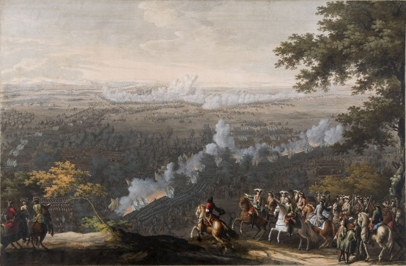 Баталия при Лесной. Гравюра Н. Лармессена с картины художника П.Д. Мартена-младшего, 1722–1724 гг.